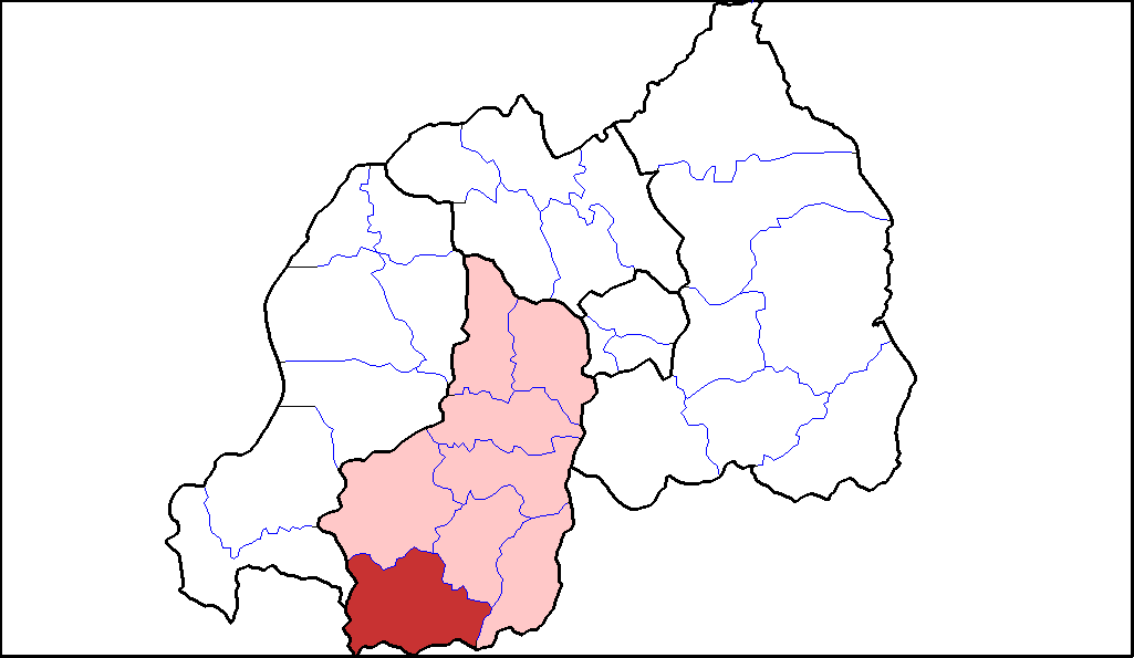 Distretto di Nyaruguru.